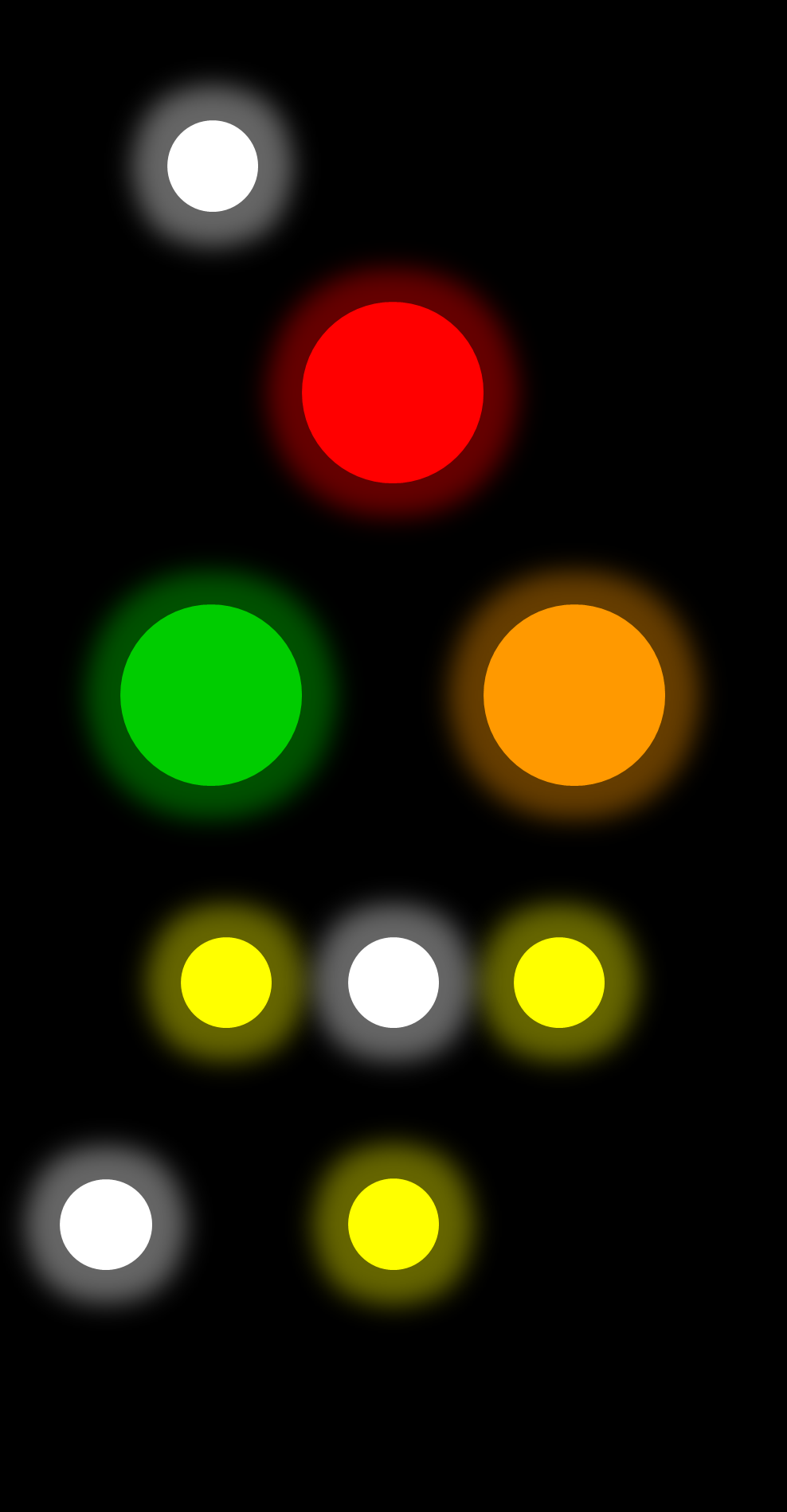 Ks-Mehrabschnittssignalschirm mit allen Signallampen (leuchtend).